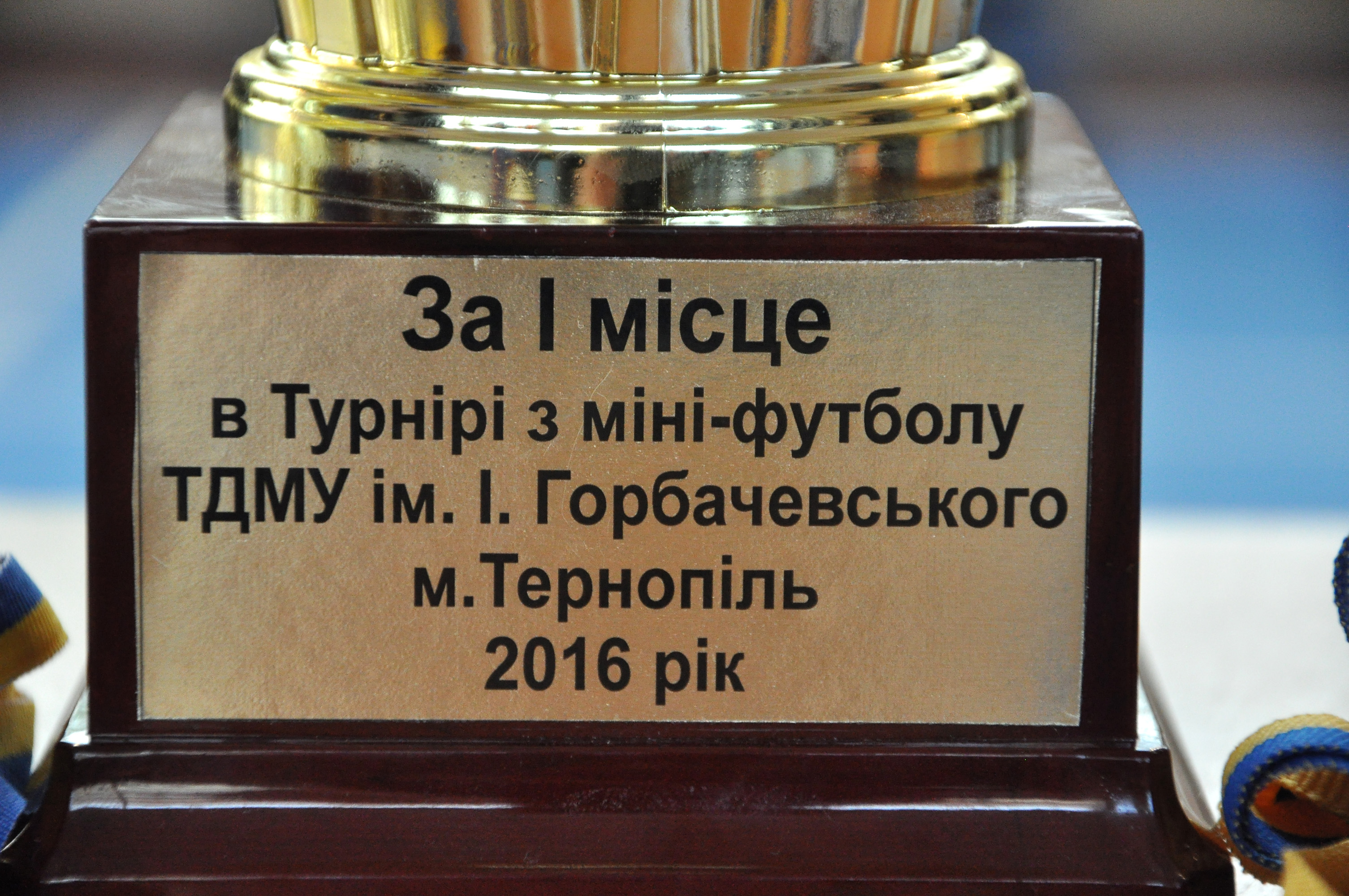 Міні-футбол «Ліга чемпіонів» Тернопільського державного медичного університету імені І. Я. Горбачевського. Півфінальні та фінальний поєдинки 26 квітня 2016 року. Напис на кубку: «За І місце в Турнірі з міні-футболу ТДМУ ім. І. Горбачевського. м. тернопіль. 2016 рік».